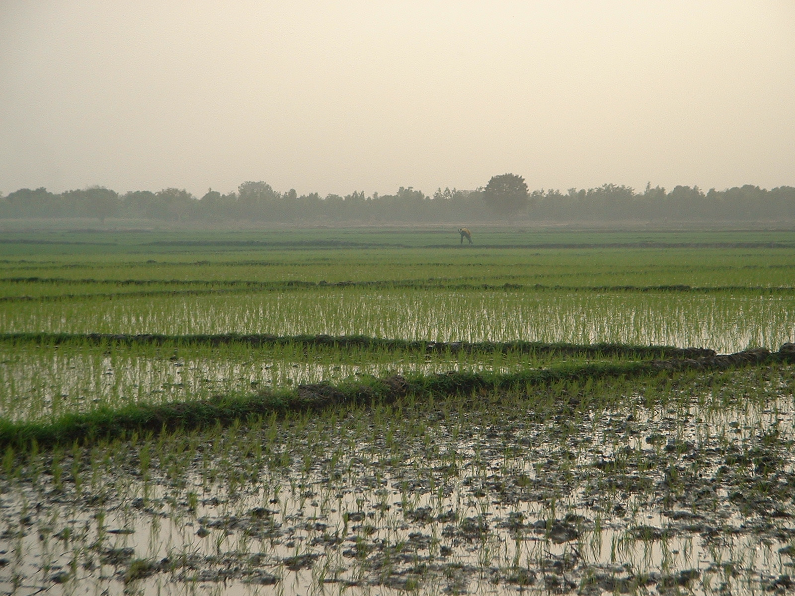 Périmètre rizicole de Bama